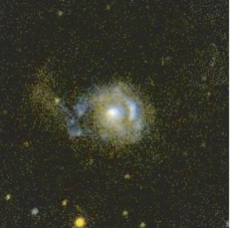 NGC 2782, Arp 215